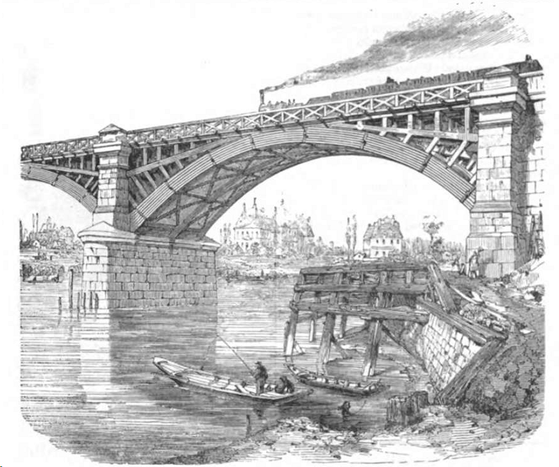 Die Brücke von Maisons.